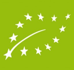 logó